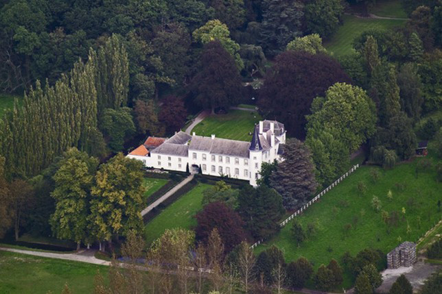 Kasteel van Trockaert in Ulbeek, een deelgemeente van Wellen Bron: eigen werk van Rik Neven